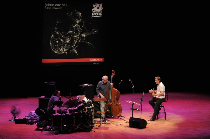 Akbank Caz Festivali, Arild Andersen Trio konseri